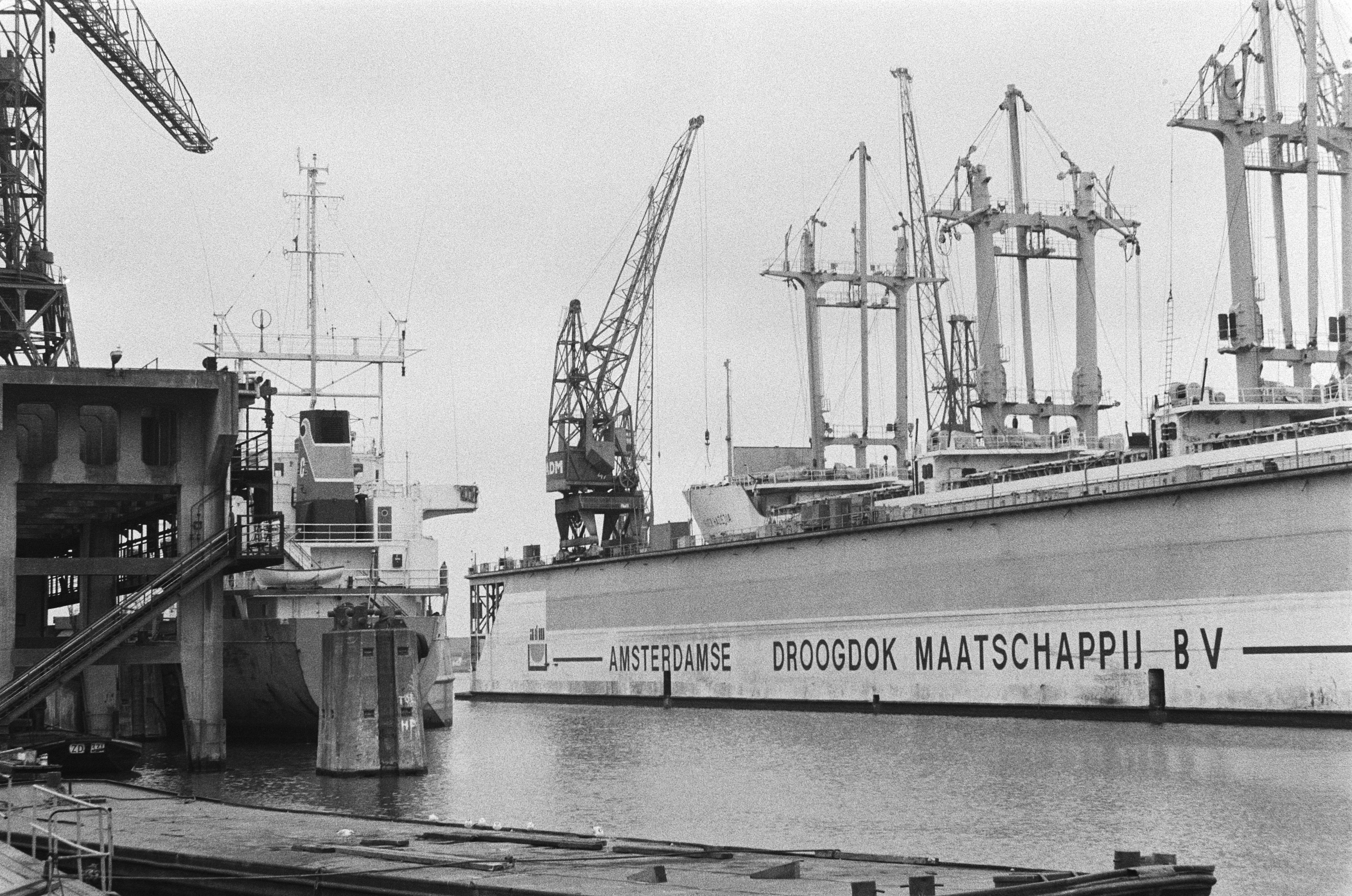 Collectie / Archief : Fotocollectie Anefo Reportage / Serie : [ onbekend ] Beschrijving : Ondernemingsraad NSM licht personeel in over evt. subsidie die met Minister Van Aardenne is besproken, werf ADM (Amsterdamse Droogdok Maatschappij) Datum : 19 februari 1981 Trefwoorden : MAATSCHAPPIJEN, ondernemingsraden, scheepswerven Persoonsnaam : Minister van Aarde Instellingsnaam : ADM Fotograaf : Dijk, Hans van / Anefo Auteursrechthebbende : Nationaal Archief Materiaalsoort : Negatief (zwart/wit) Nummer archiefinventaris : bekijk toegang 2.24.01.05 Bestanddeelnummer : 931-3311